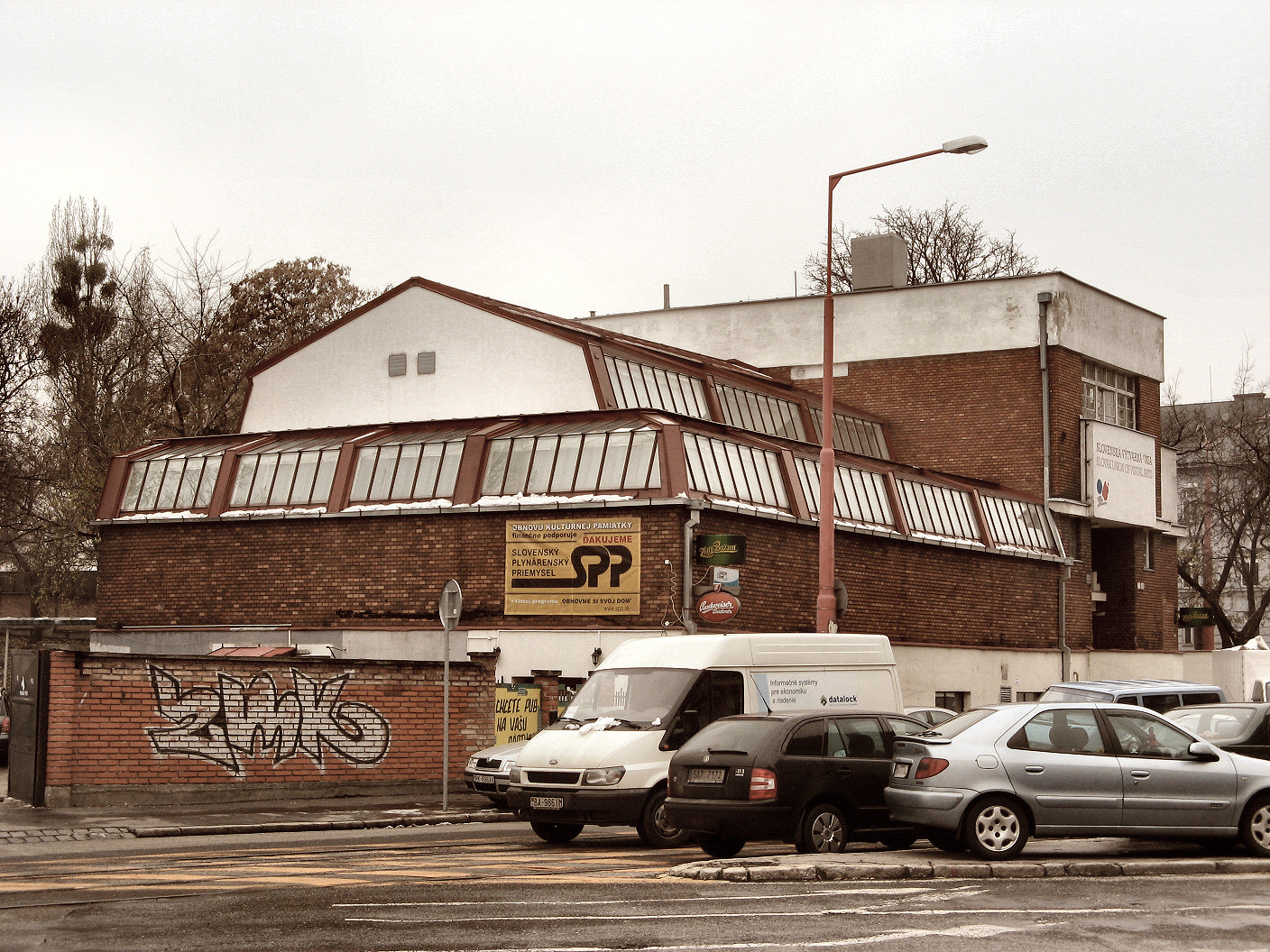 Alois Balán, Jiří Grossmann: Umelecká beseda slovenská (dnes Slovenská výtvarná únia), Bratislava, 1925